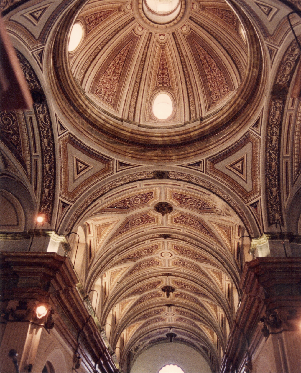 Esta pintura mural fue realizada por el pintor Juan Ruiz Miralles, en la cúpula de la Iglesia de San Sebastián, en la provincia de Almería, ciudad donde nació y creció el artista.